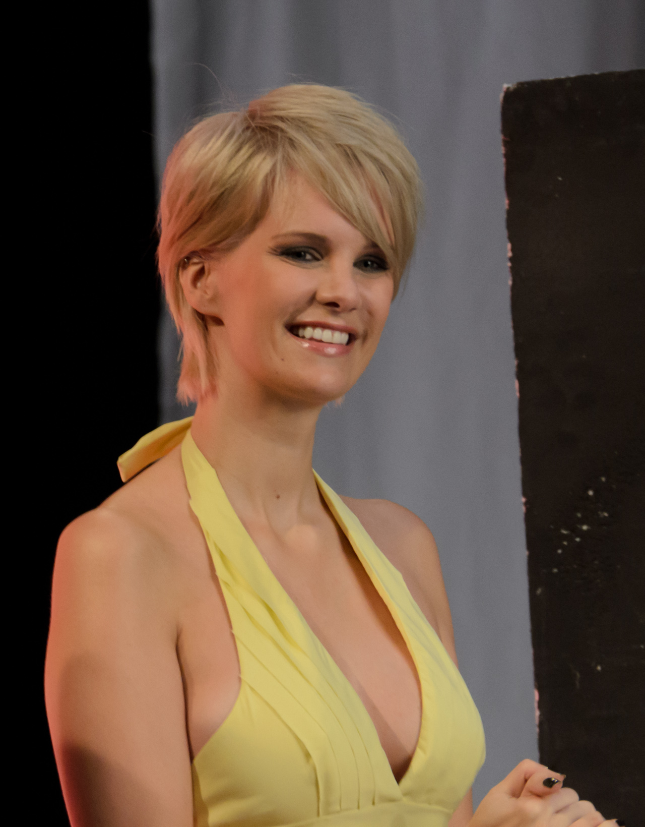 Monica Ivancan auf der Nikon Solutions 2012 in Essen bei einem Shooting mit Mayk Azzato